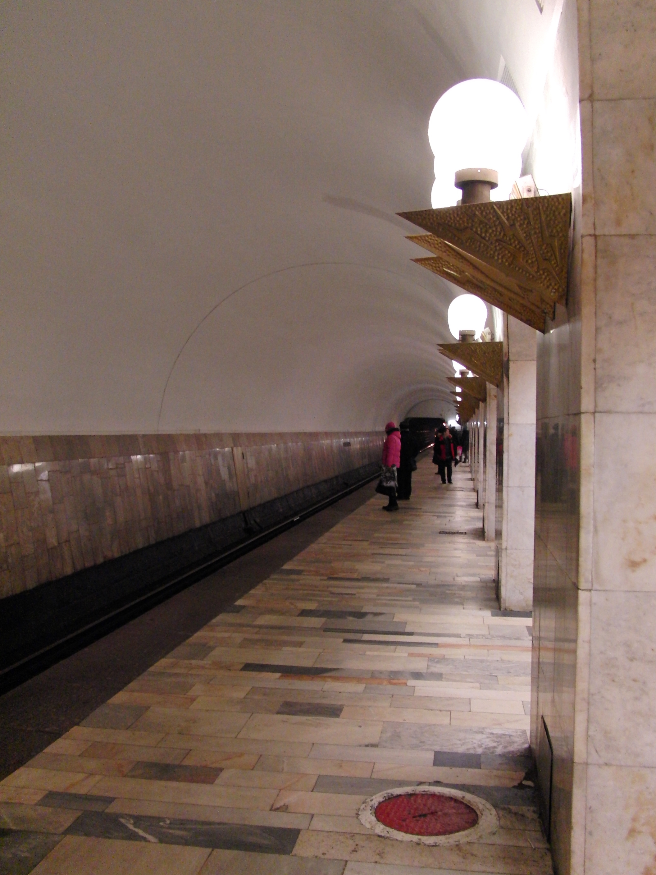 Aviamotornaya (Авиамоторная)